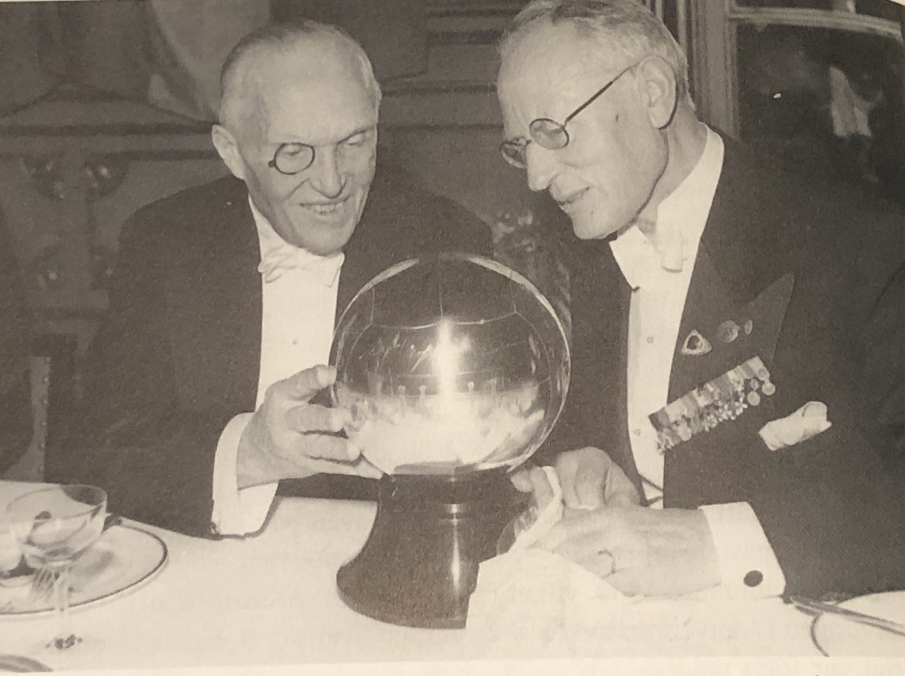 De två före detta fotbollsgeneralerna Clarence von Rosen och Anton Johansson synar den senares minnesgåva vid Svenska Fotbollsförbundets 40-årsjubileum år 1944.